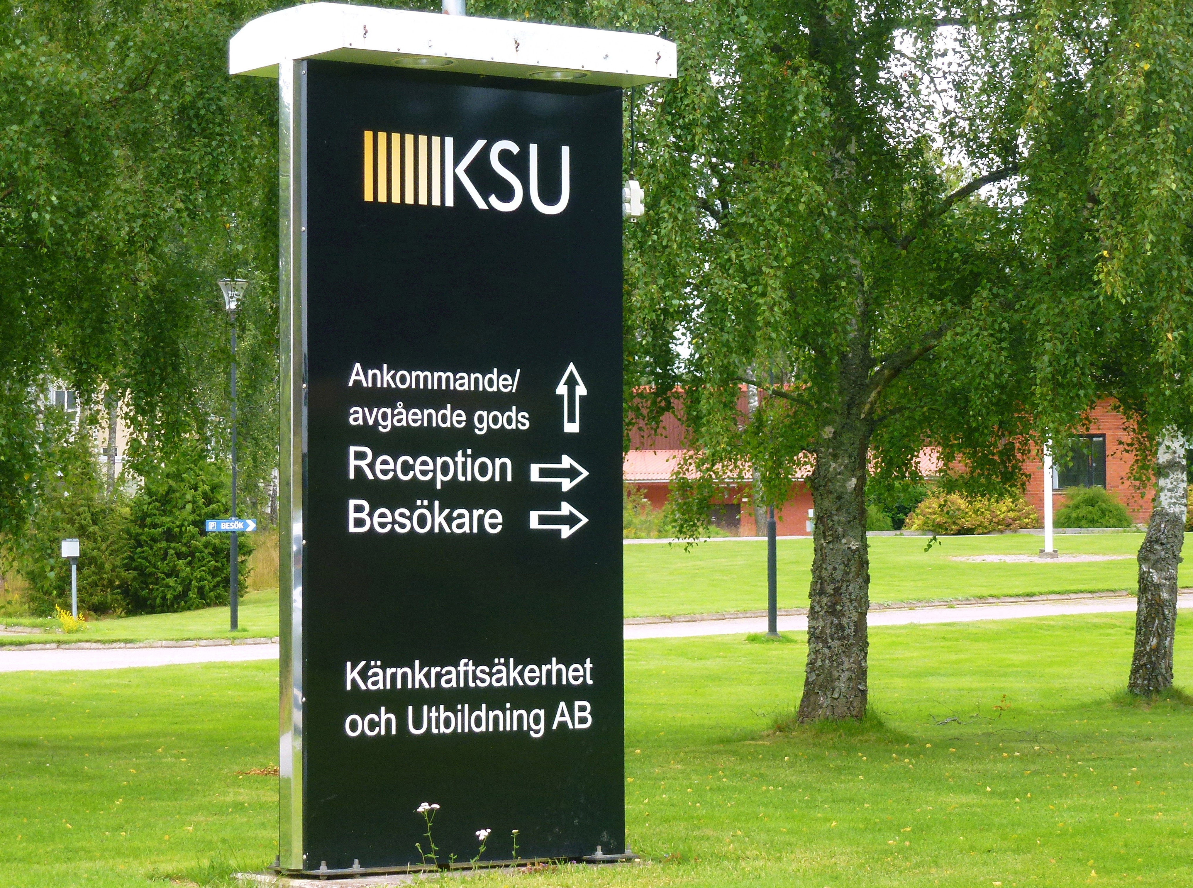 Kärnkraftsäkerhet och Utbildning AB skylt i Studsvik